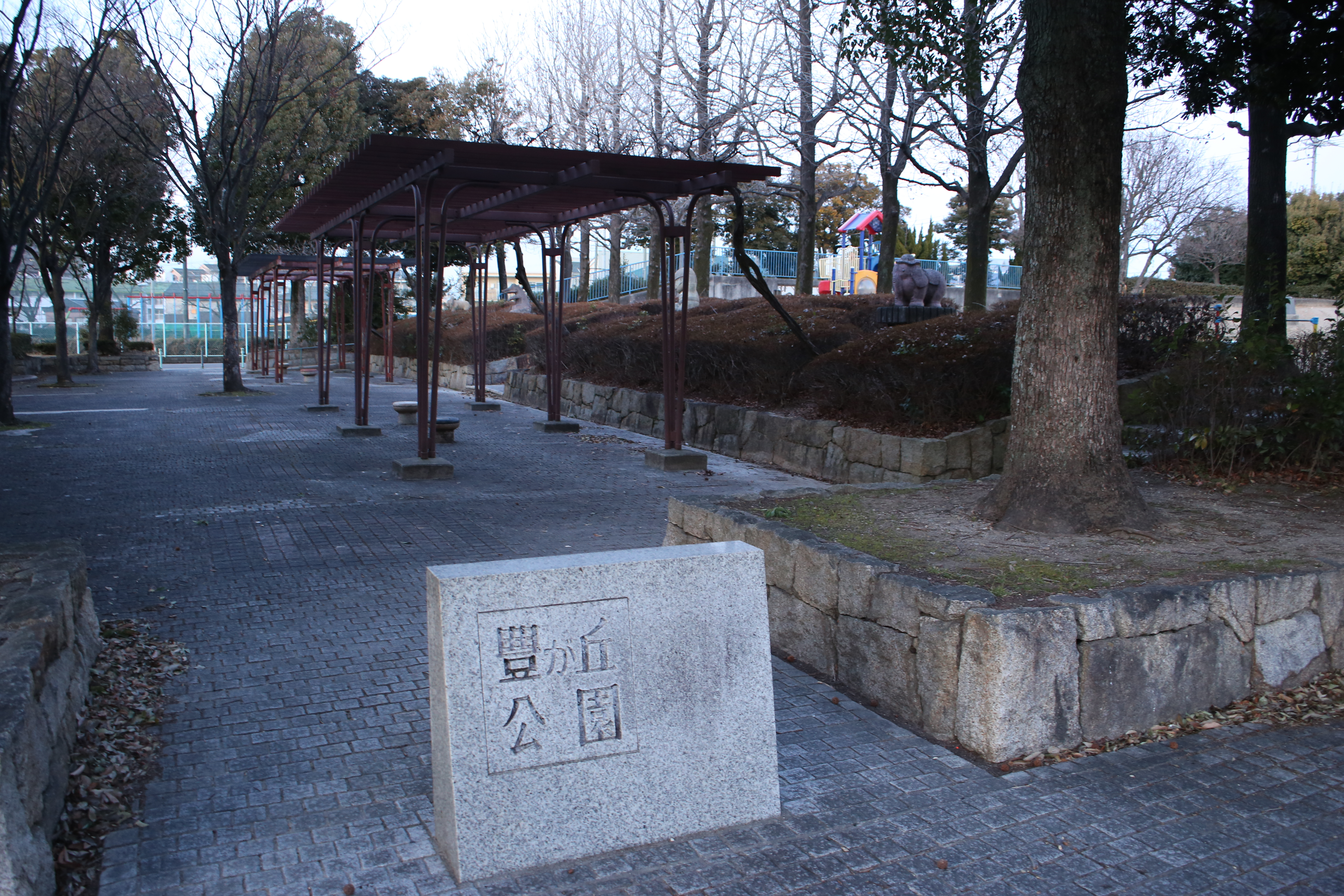 名古屋市名東区豊が丘の豊が丘公園